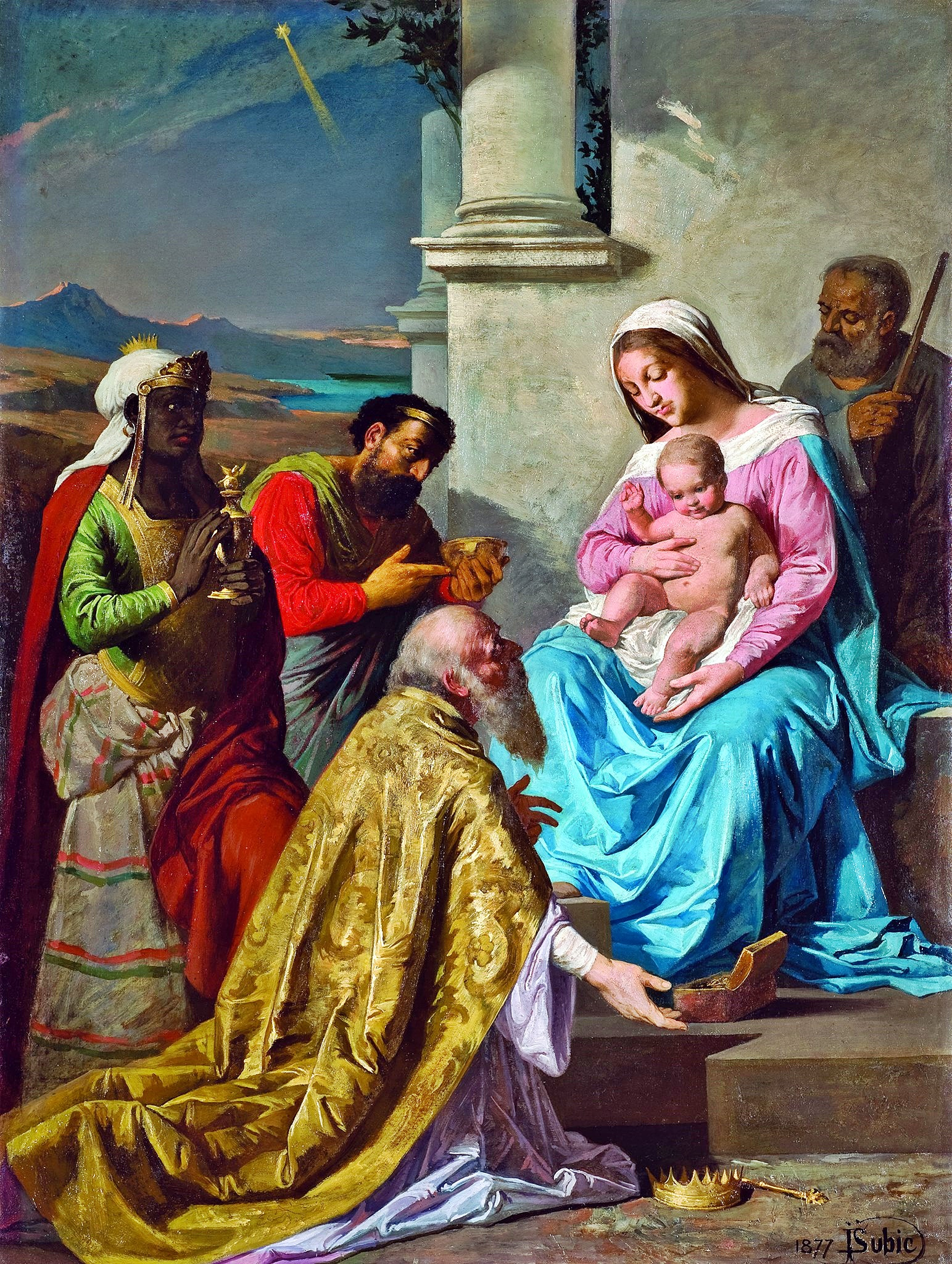 Janez Šubic, Anbetung der Hl. Drei Könige, 1877